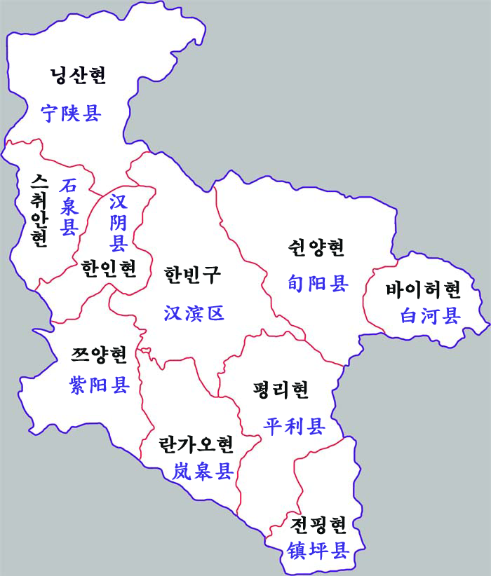 안캉시 현급구역도